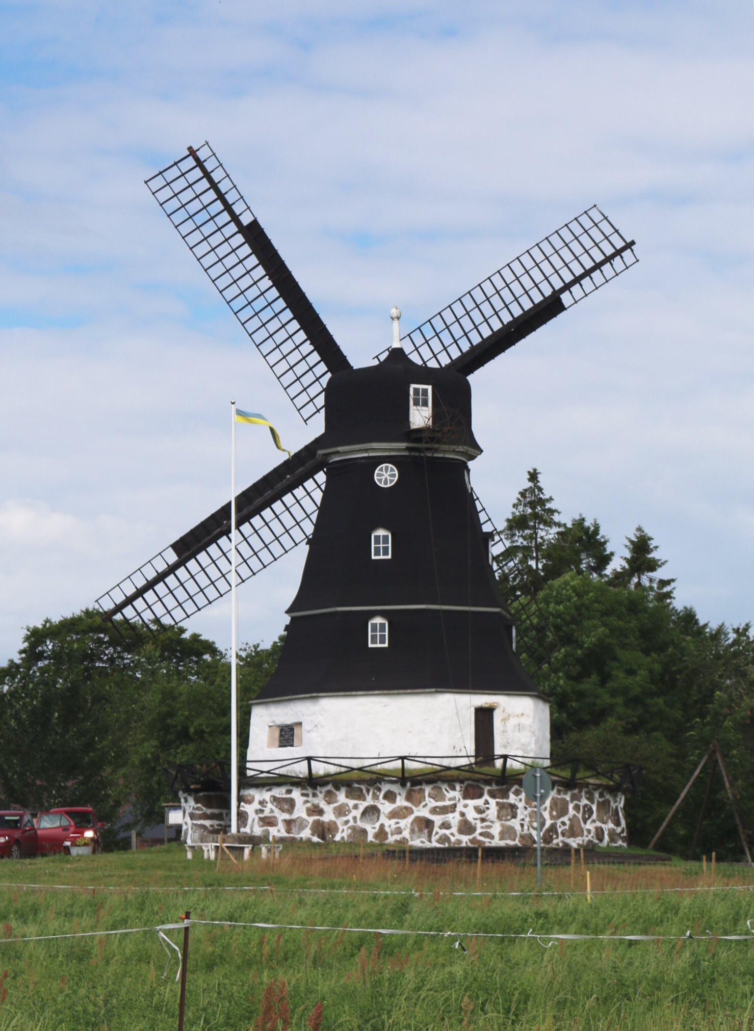 Sankt Olofs mölla